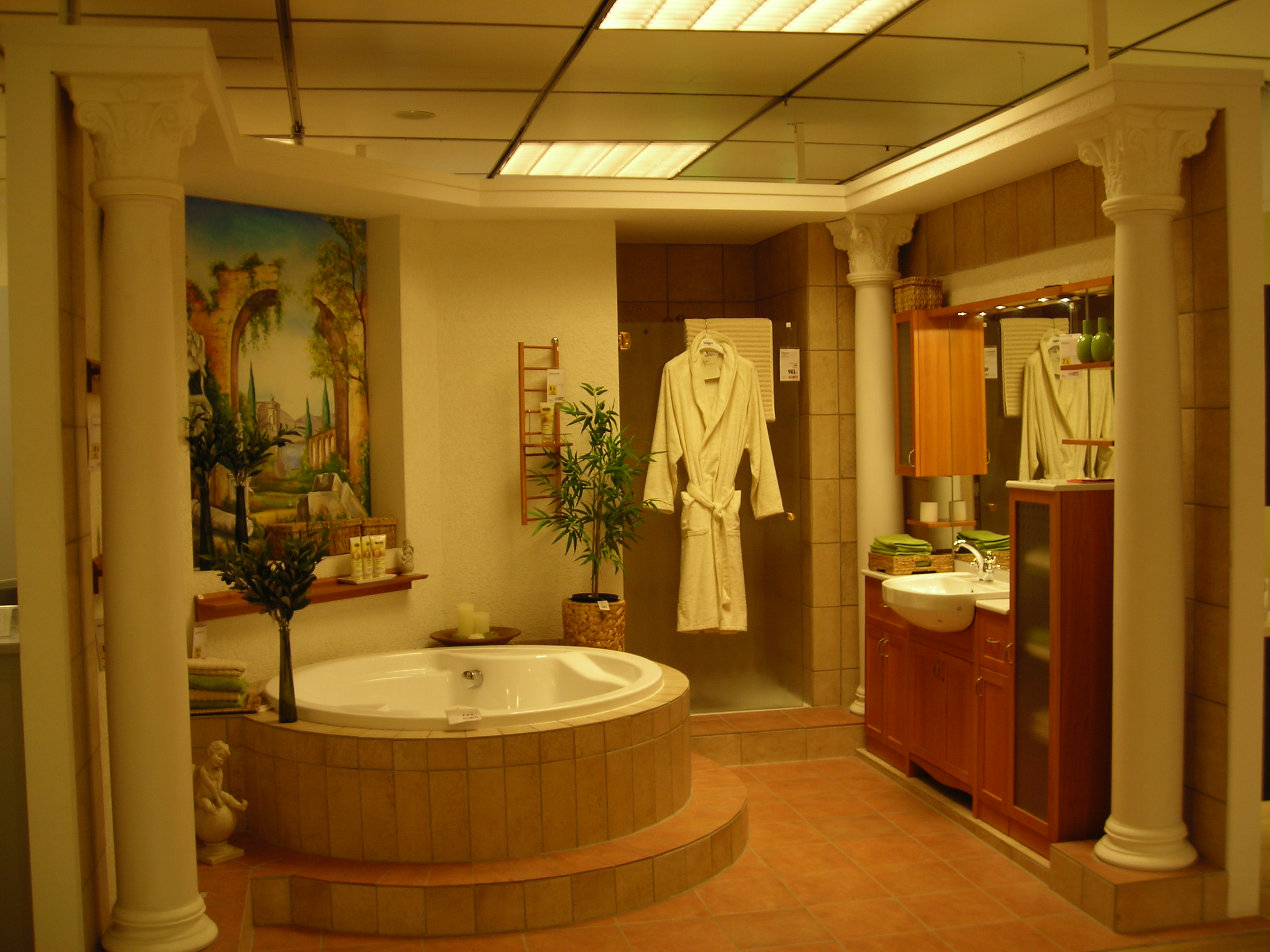 Badezimmer (Ausstellung in einem Möbelhaus)